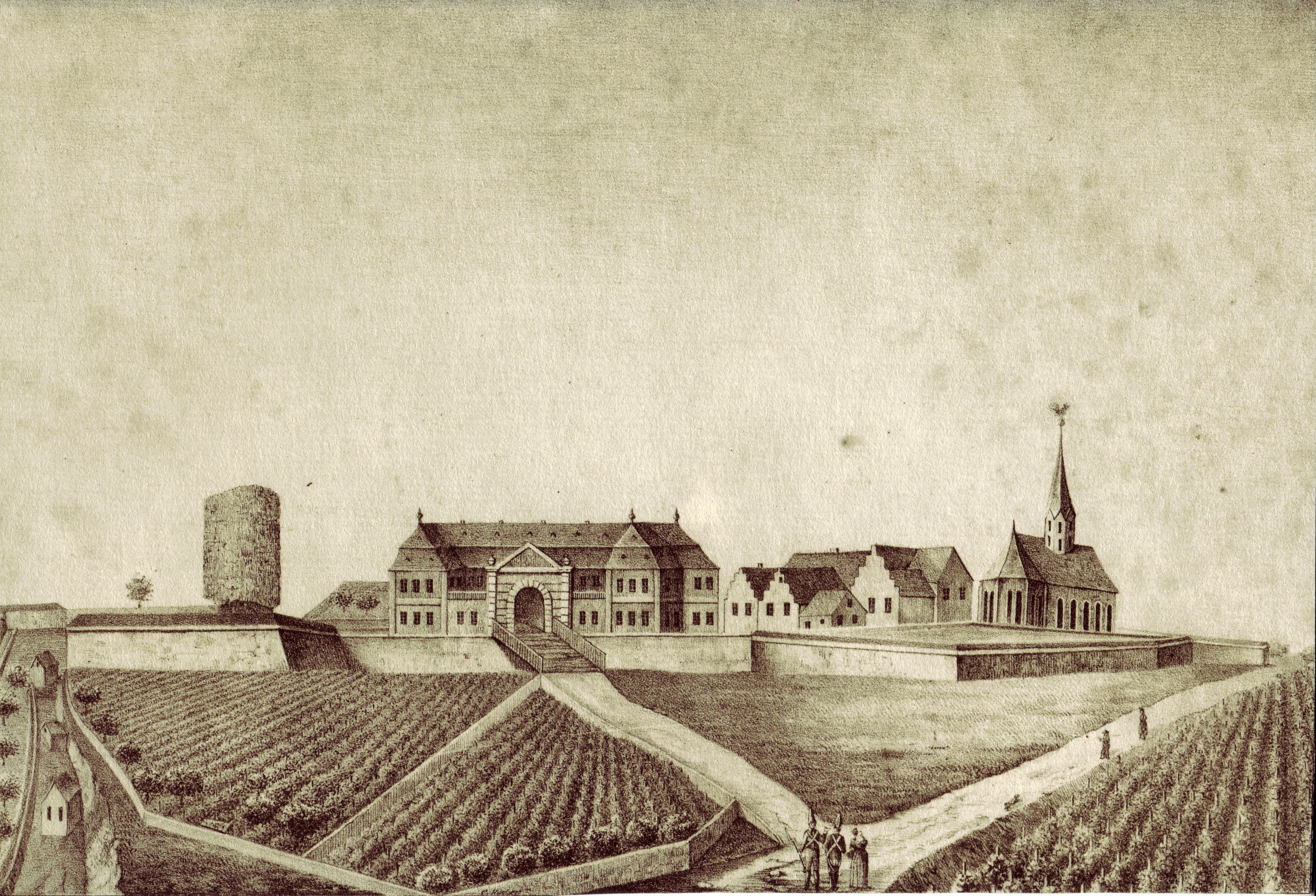 [Originalbeschreibung] Ursprünglich erbaut im Jahre 1050 von dem Erzbischof Luipold lag es außerhalb der Stadt; durch die Erbauung der Zitadelle kam es in dieselbe. Die darin wohnenden Ordensgeistlichen waren Benedictiner. Es hatte das Unglück 3 mal zerstört zu werden. Das erstemal durch die Ermordung des Erzbischofs Arnold von Selenhofen von den Bürgern und nicht ganz ohne Theilnahme der Mönche; das zweitemal durch die rebellirenden Bürger 1329, wornach es 131 Jahre als Schutthaufen lag und erst im Jahre 1461 unter dem Abt Eberhard von Venlovon den Bürgern als Strafe neu erbaut wurde, so wie es obiges Bild zeigt. Das drittemal bei der Belagerung von 1793 durch Brand wo nur der eine Flügel gerettet wurde und noch jetzt als Kaserne dient.